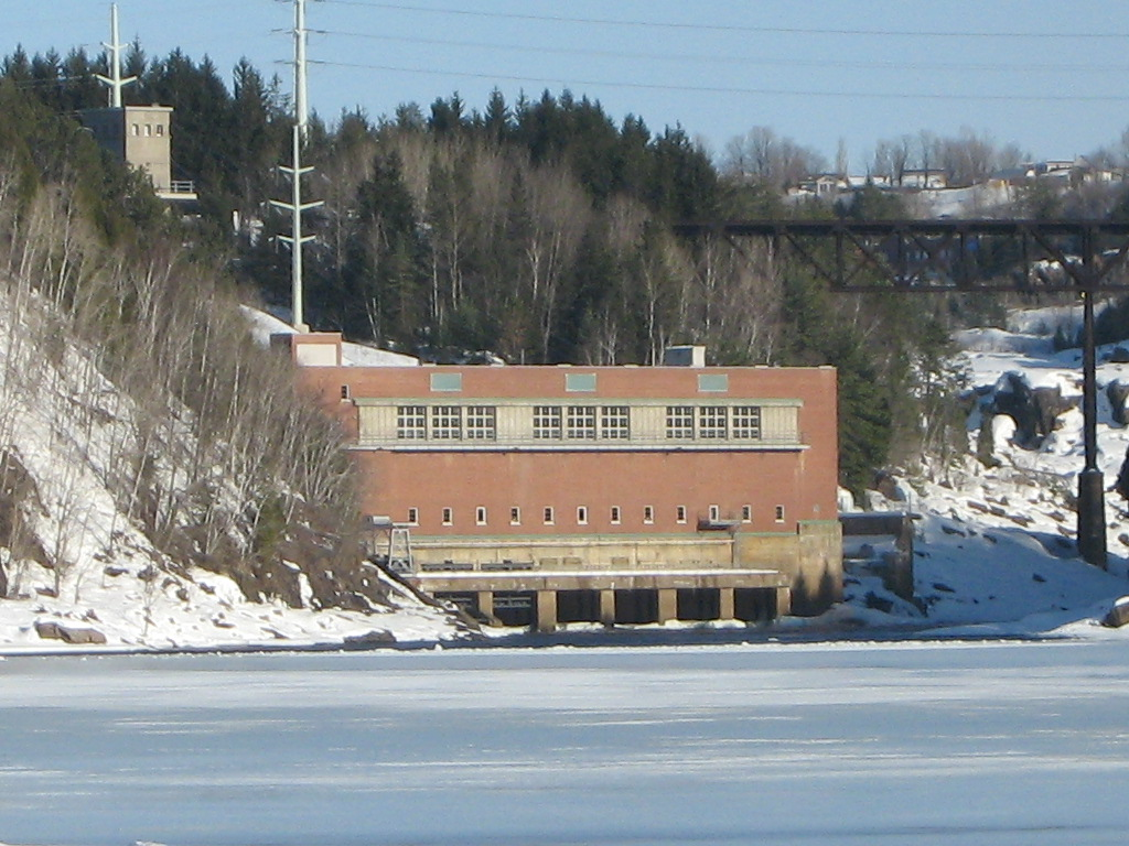 Centrale Shawinigan-3, à Shawinigan, Québec (Canada)